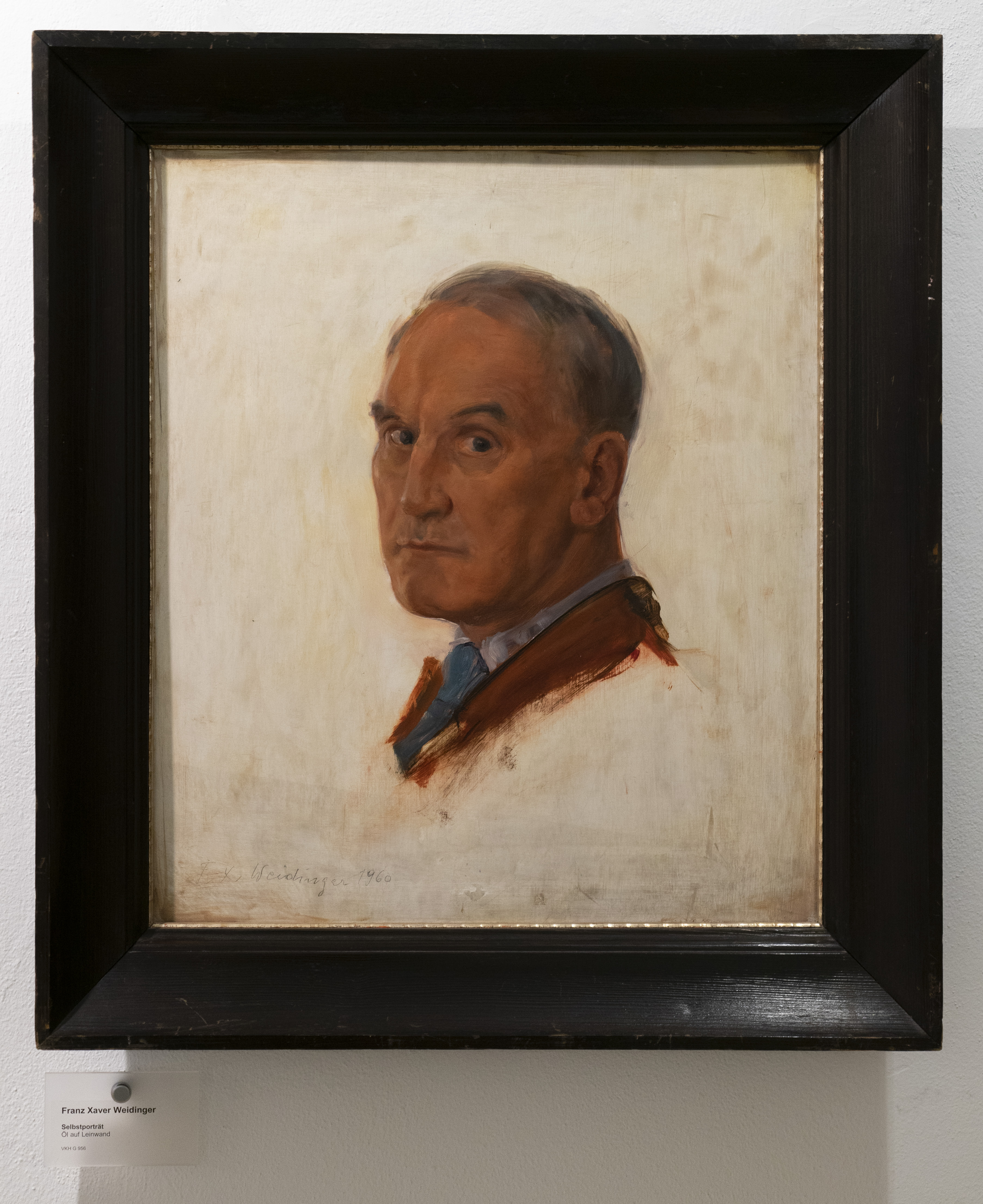 Volkskundehaus Ried Selbstportrait Franz Xaver Weidinger